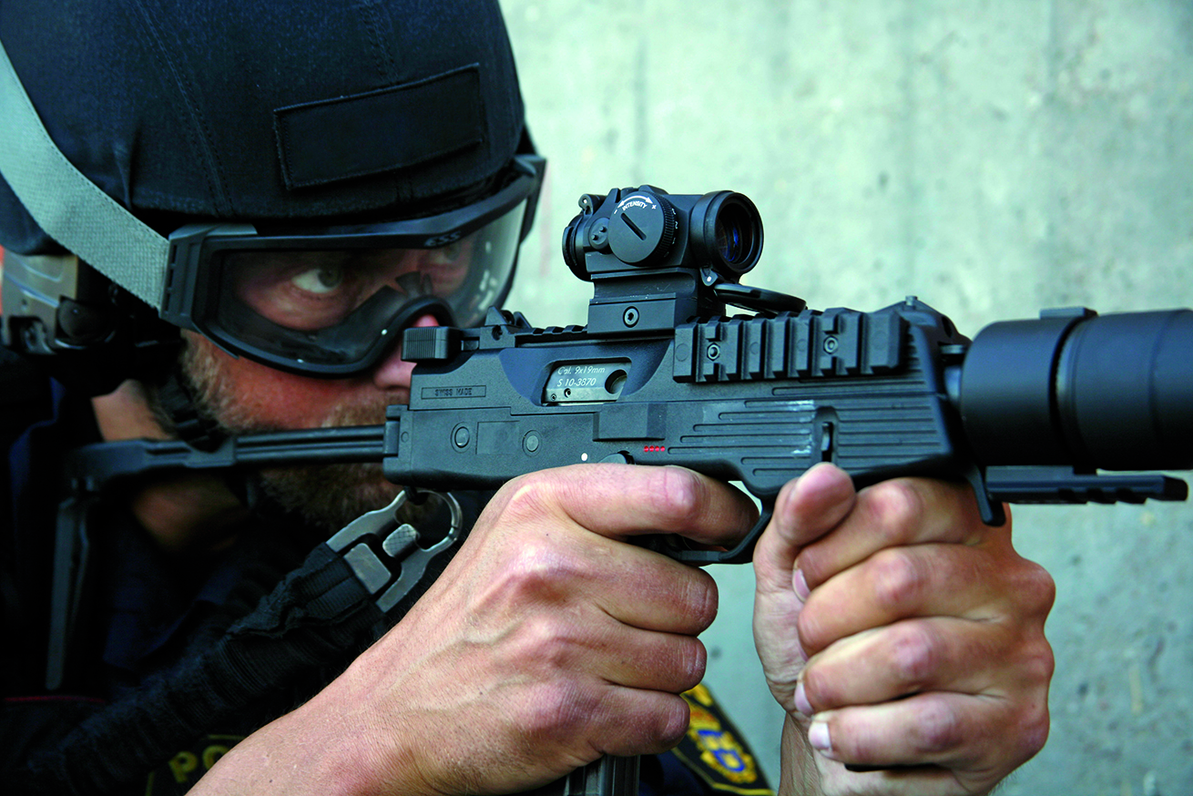 Police with Aimpoint Micro T-2